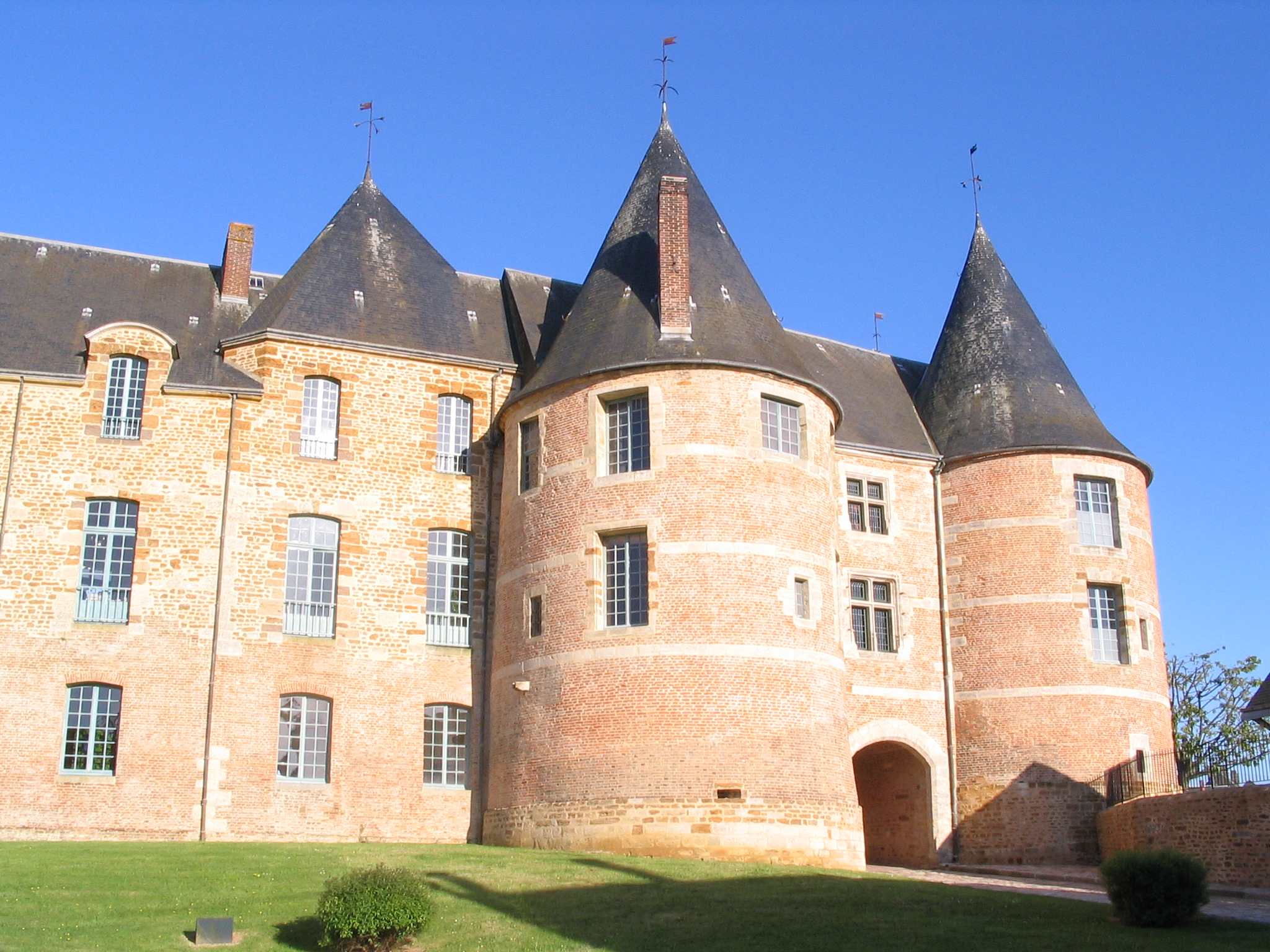 château des 12ème et 16ème siècles, en pierre et briques rouges (Gacé,,Orne, France)